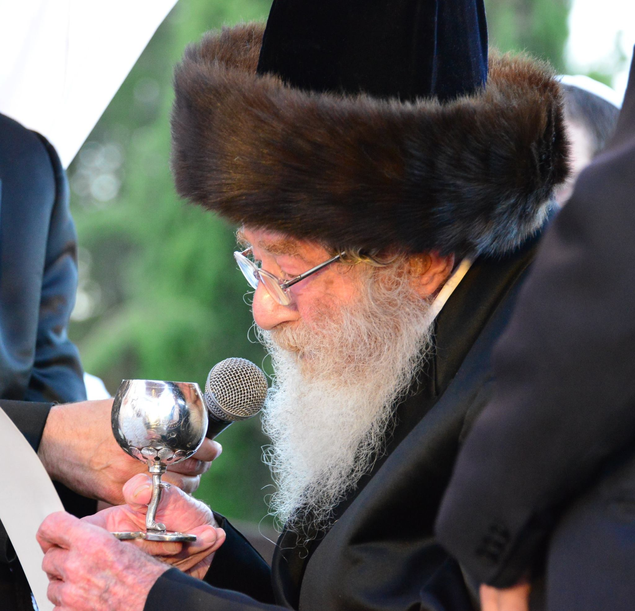 בחתונה לאחד מבני משפחתו